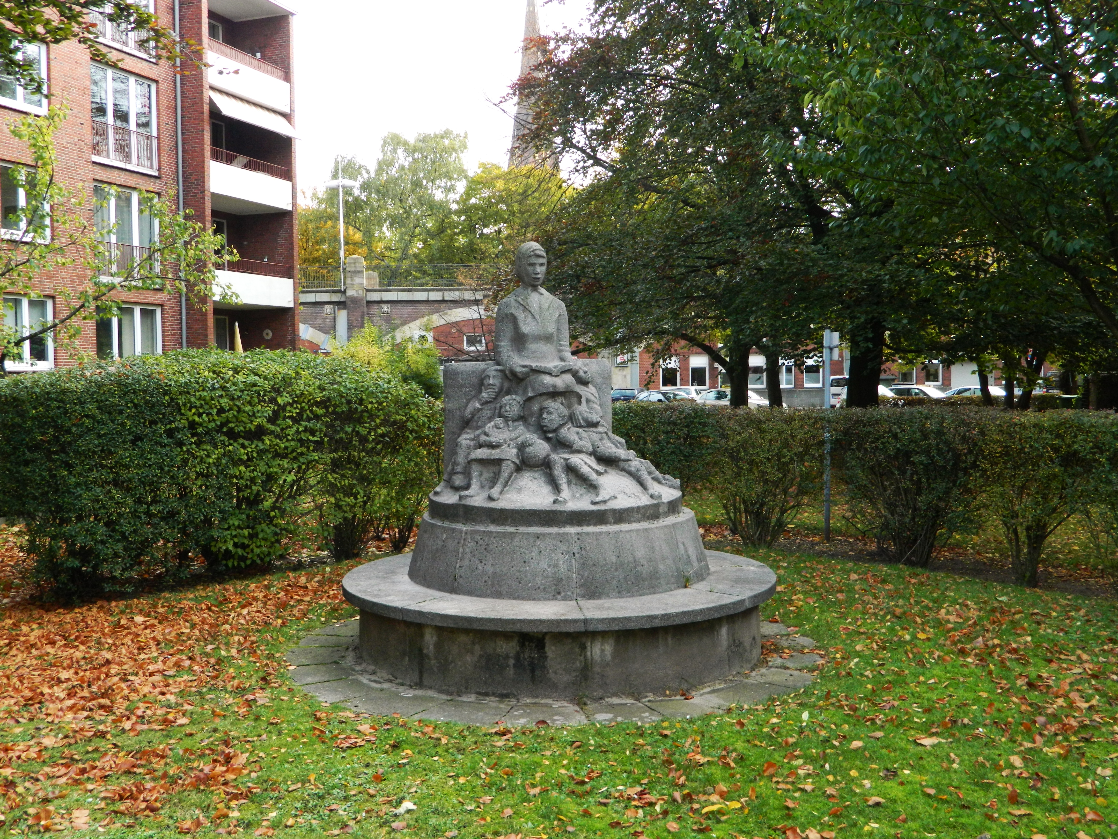 Uhlenhorst, Hamburg, Germany